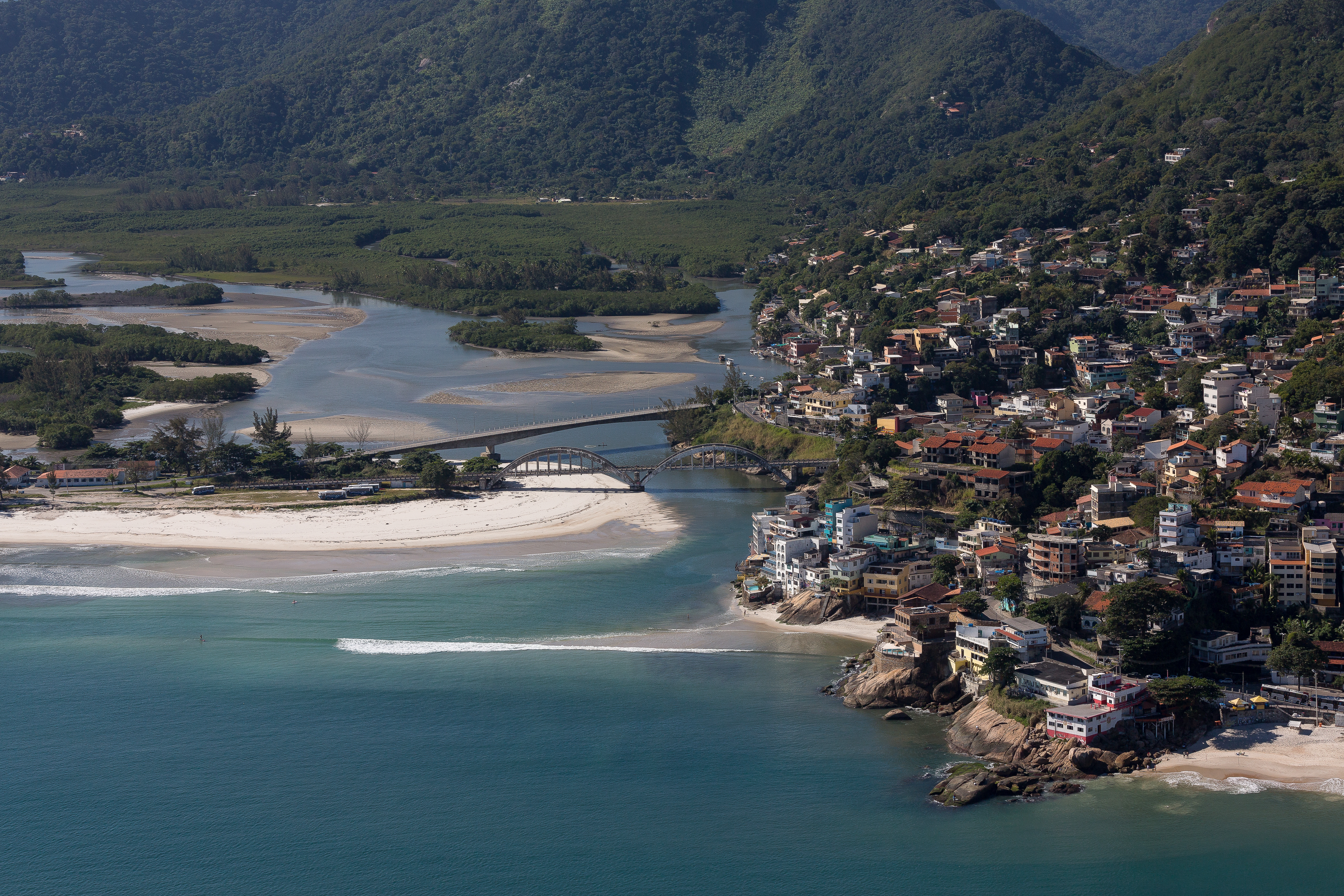 Vista aérea da Barra de Guaratiba, Rio de Janeiro - RJ - Brasil.